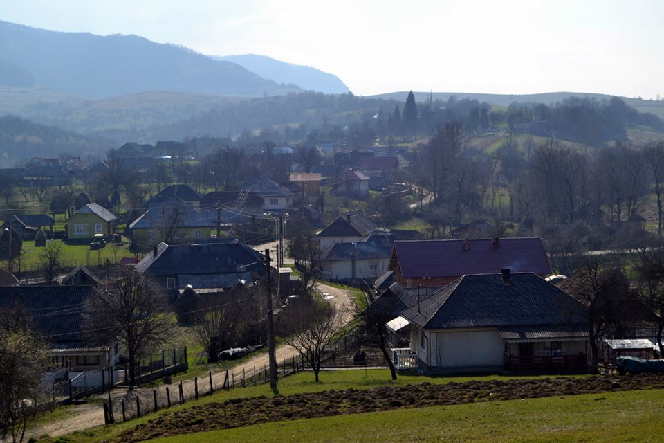 Vedere asupra satului Peteritea, Județul Maramureș.